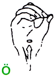 Der Buchstabe 'Ö' im deutschen Fingeralphabet, entsprechend einer Infokarte des Landesverbandes Bayern der Gehörlosen e.V. (